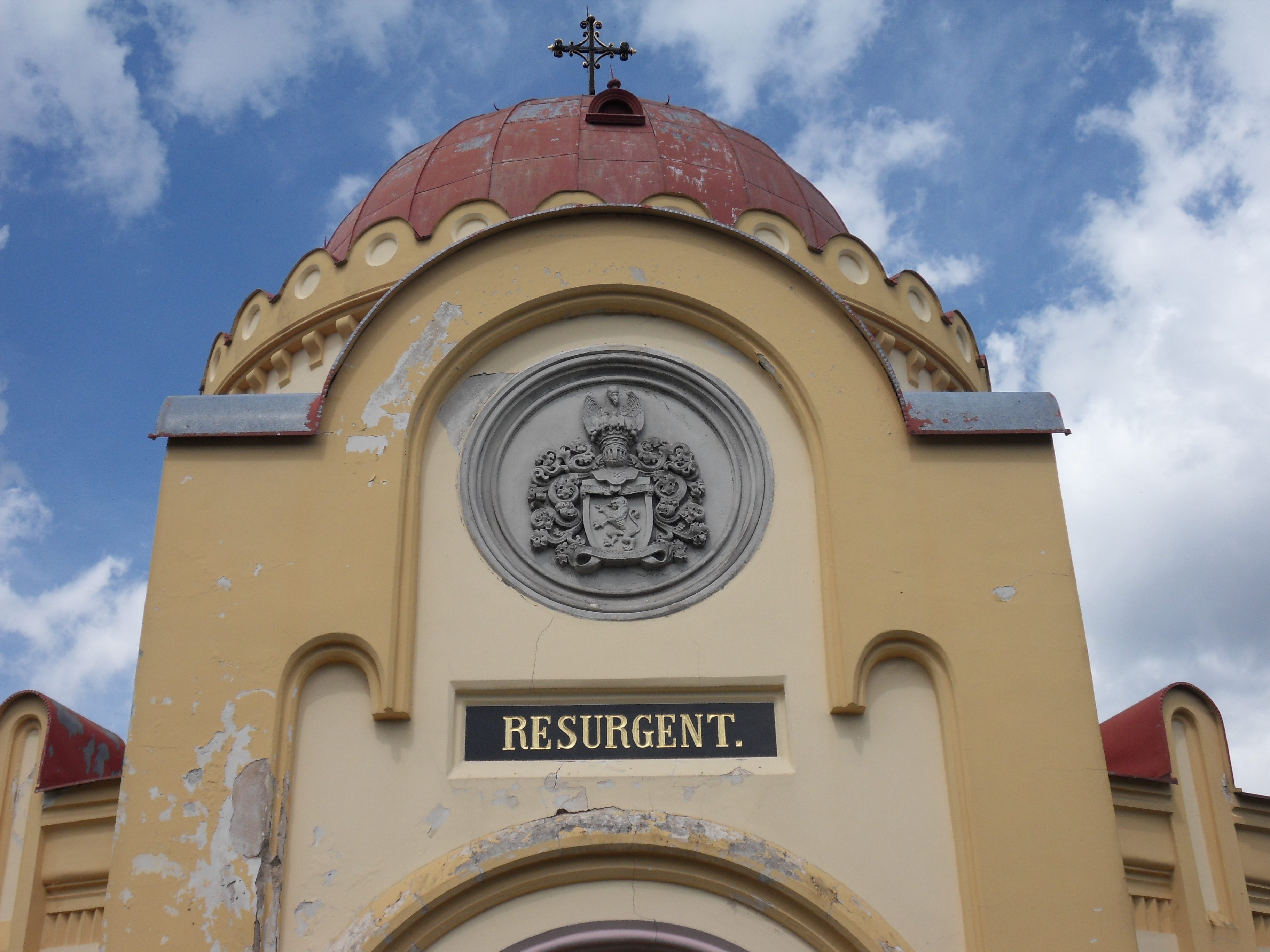 Pohřební kaple svaté Terezie, parčík za dvorem, Hrad Nečtiny.